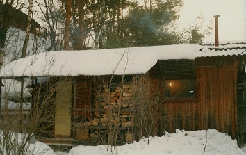 Сейчас в повседневном быту под парными банями понимаются все те способы теплого (горячего) бытового мытья, которые совсем не похожи на городские квартирные ванные и душевые комнаты, но которые способны "мыть и парить" даже в полностью автономных условиях (например, в полевых), при отсутствии, в частности, водопровода и электричества.